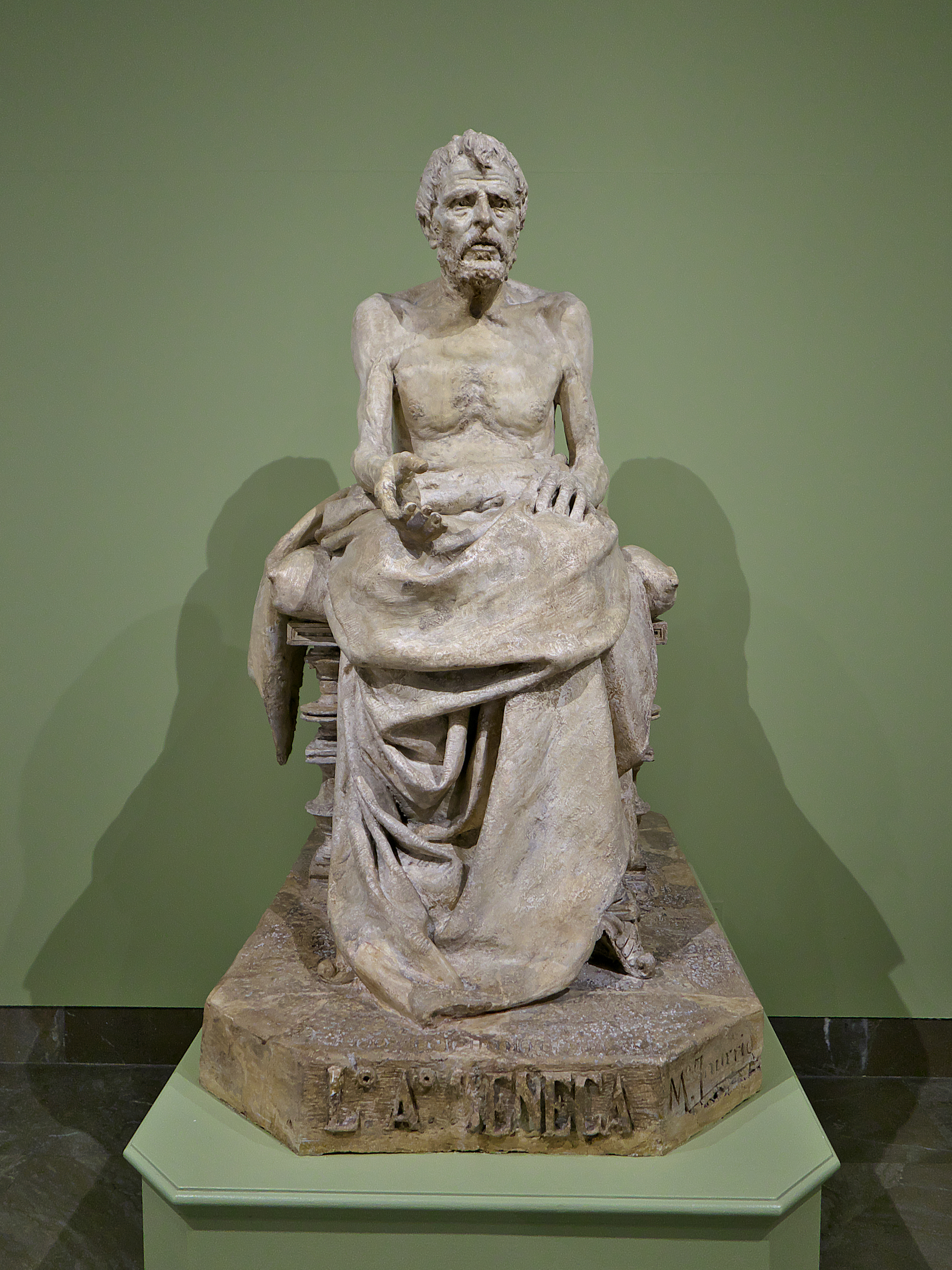 Museo de Bellas Artes de Córdoba. Escultura en yeso patinado de Séneca esculpida por Mateo Inurria (1894-1895).